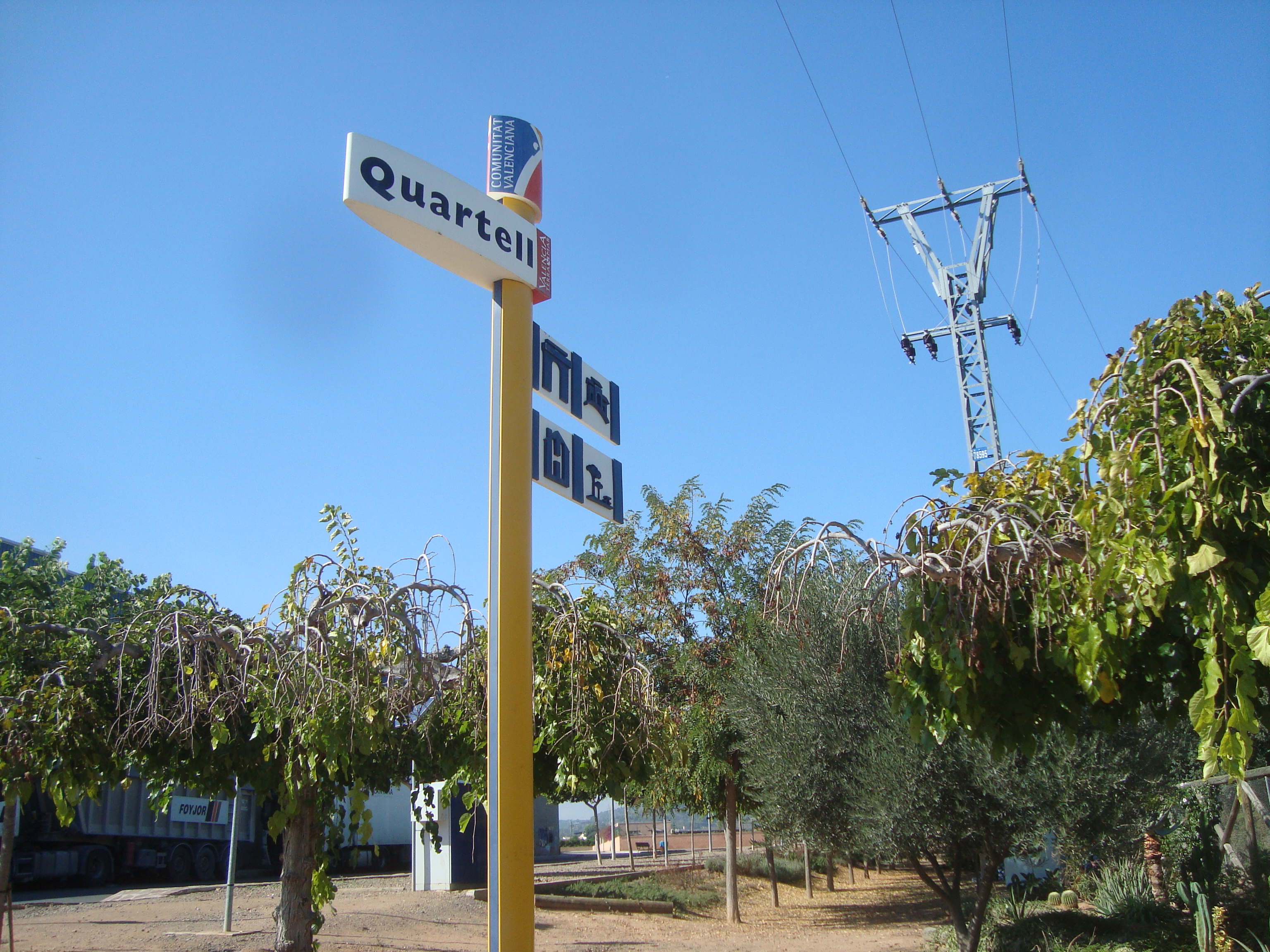 Quartell, turismo (Valencia)